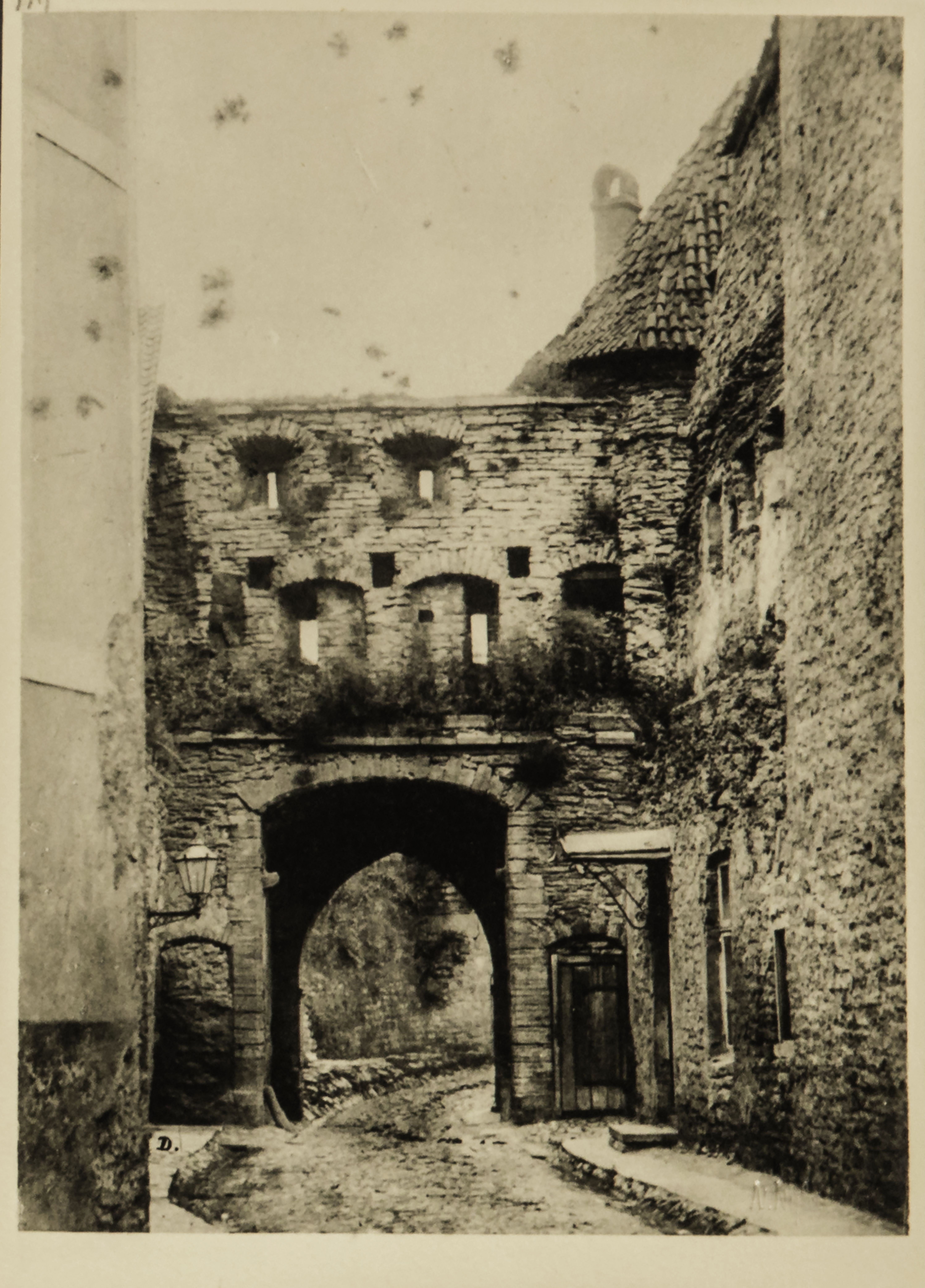 Nunne värav vaade seespool linnamüüri